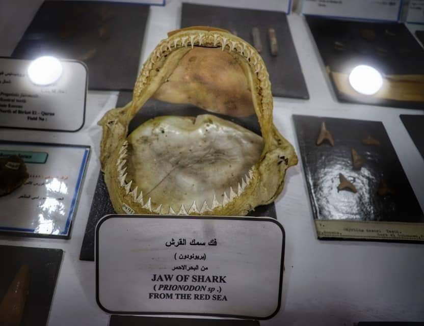 فك سمكة قرش